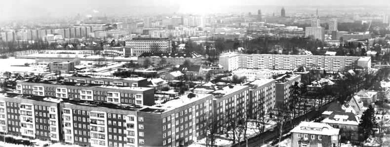 Dresden, Neubaugebiet Zschertnitz, Winter ADN-ZB Häßler 30.1.85 Dresden: 40.jahrestag der Zerstörung - Seit dem Beginn des Wiederaufbaus, ein ein erster Aufbauplan war bereits 1946 verkündet worden, entstanden über 100.000 Wohnungen. Nach dem Neuaufbau des Zentrums konzentrierte sich der Wohnungsbau auf Lückenschließung und die Errichtung ganzer neuer Stadtteile, darunter Zschertnitz. Mit 511 951 Einwohnern ist "Elbflorenz" die drittgrößte Stadt der DDR.-siehe auch 1985-0130-20N und Z 0309-310N